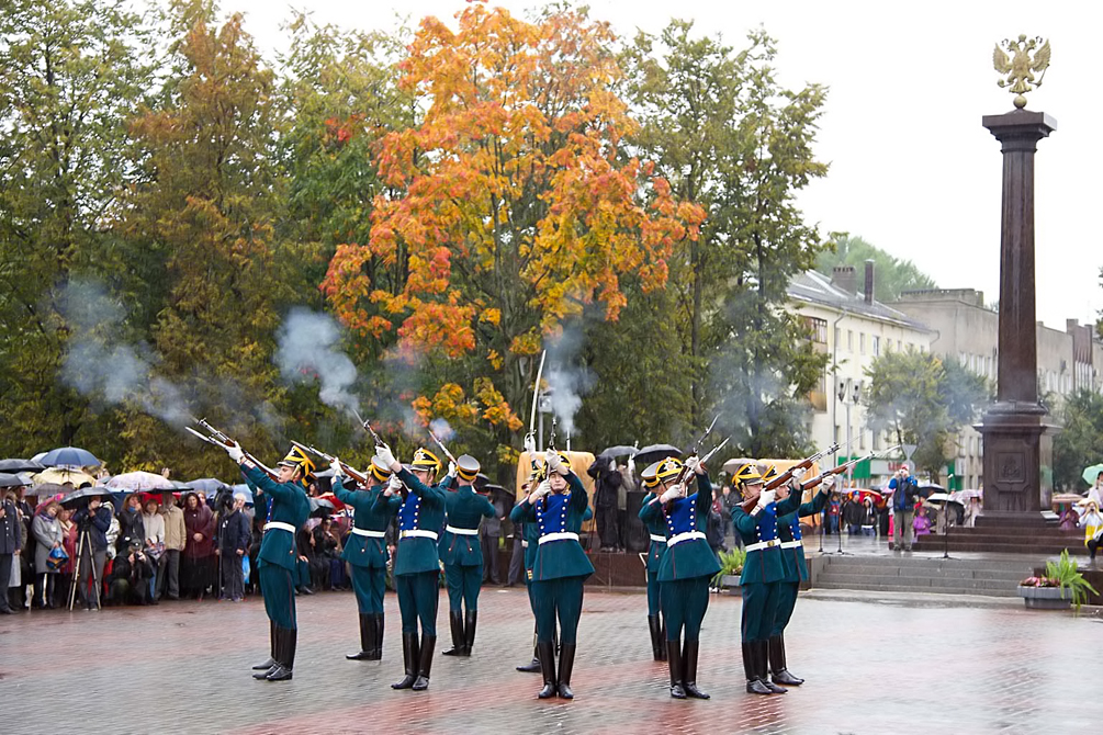 Открытие в Великом Новгороде барельефов на стеле Воинской славы.